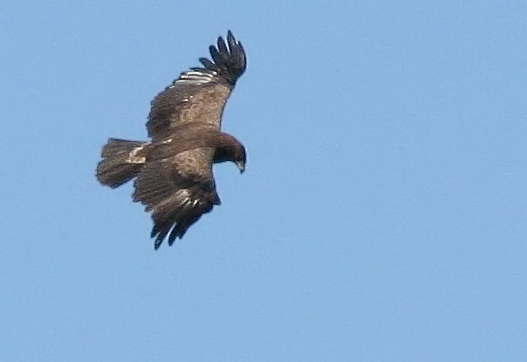 Aquila pomarina in Lasy Janowskie, Poland